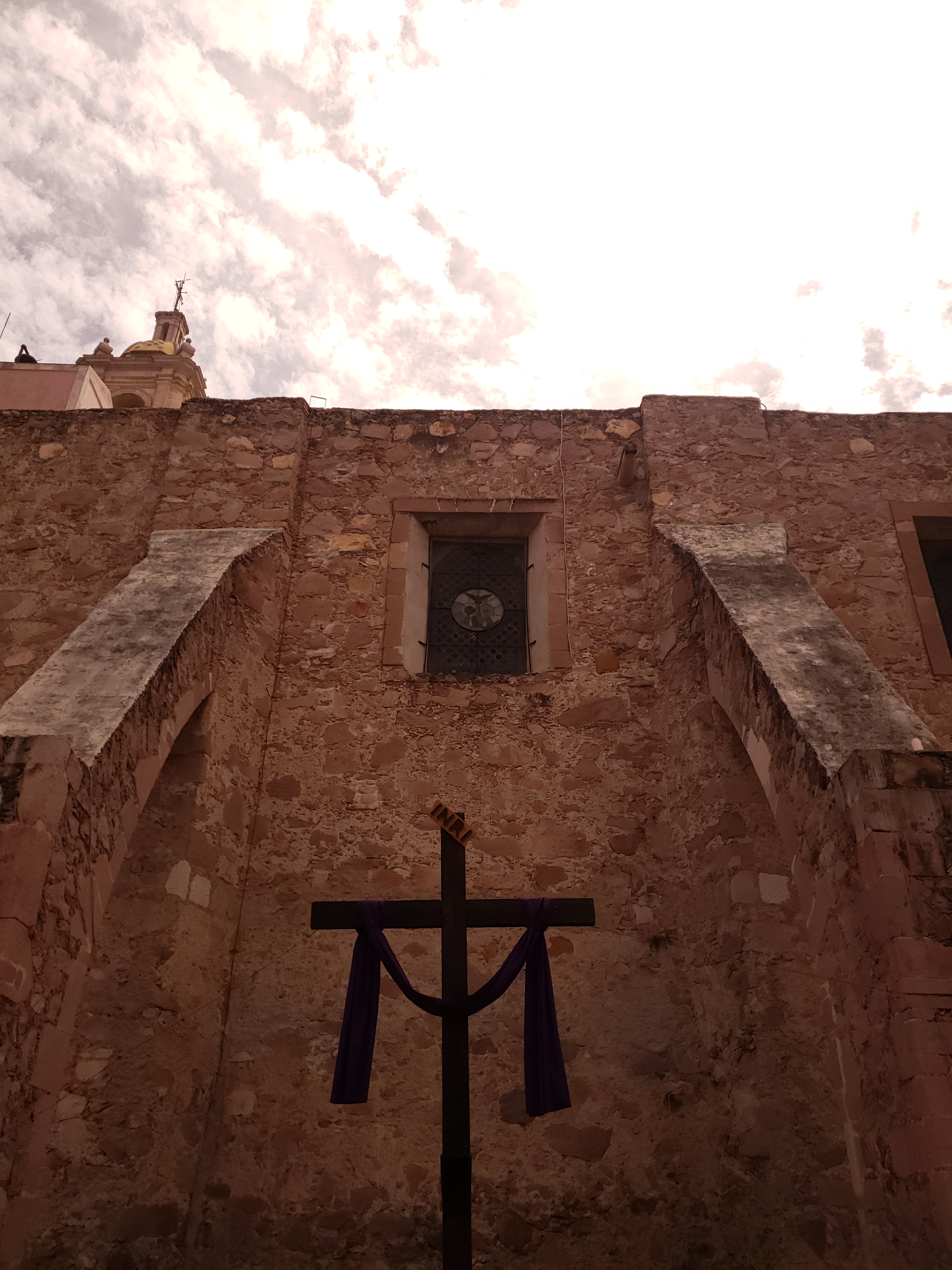 Es una foto de la fachada norte del templo de San Marcos, en ella se puede ver una pequeña ventana con un vitral además de una cruz con un paño morado indicando la cuaresma